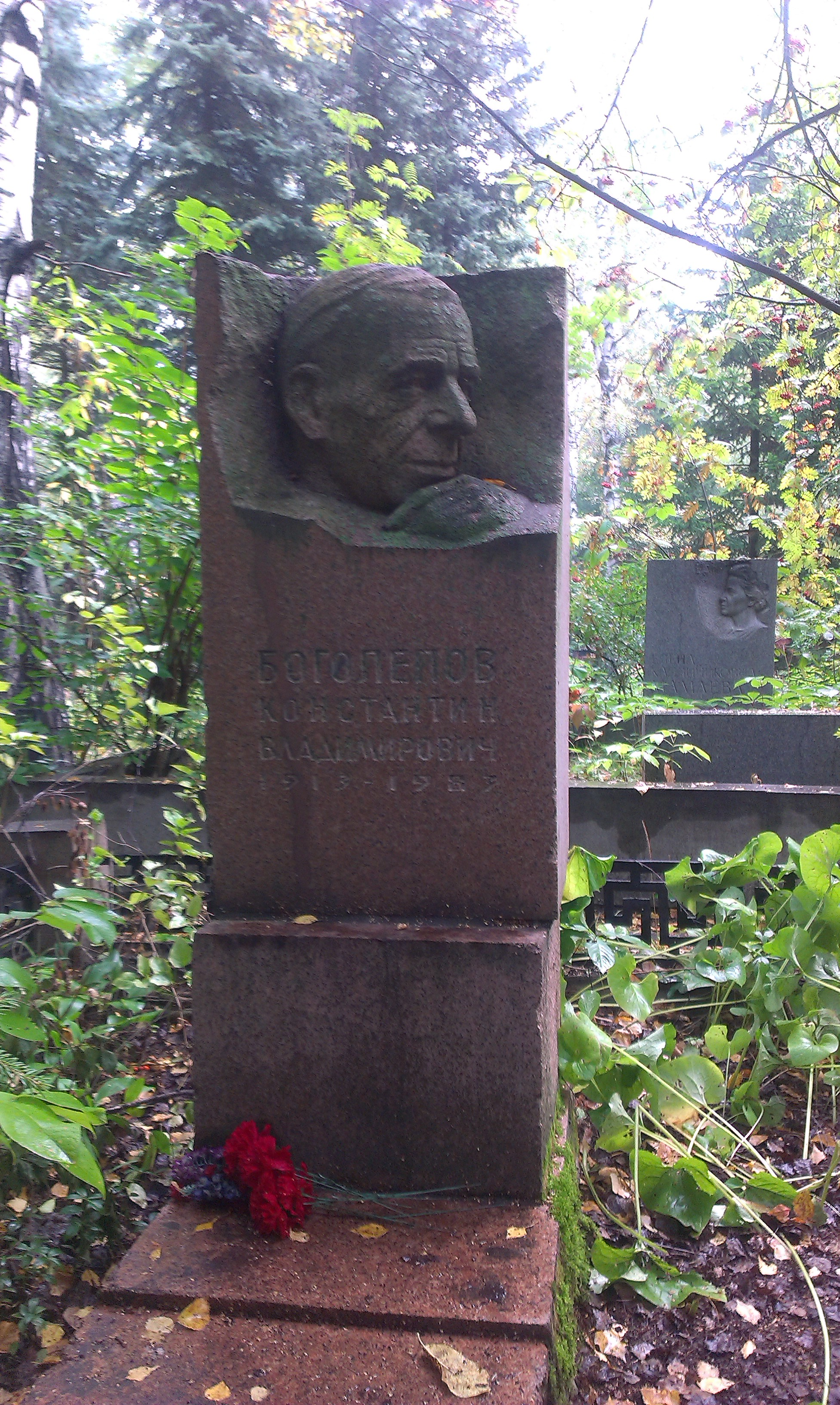 Южное (Чербузинское) кладбище